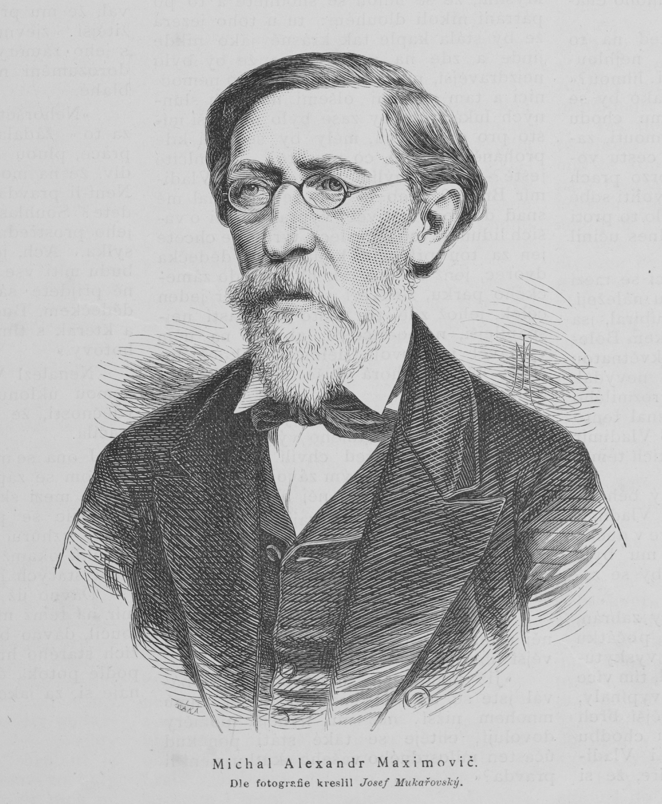 Portrait of Mikhail Alexandrovich Maximovich (Михаил Александрович Максимович, 1804 - 1873), Russian scientist.